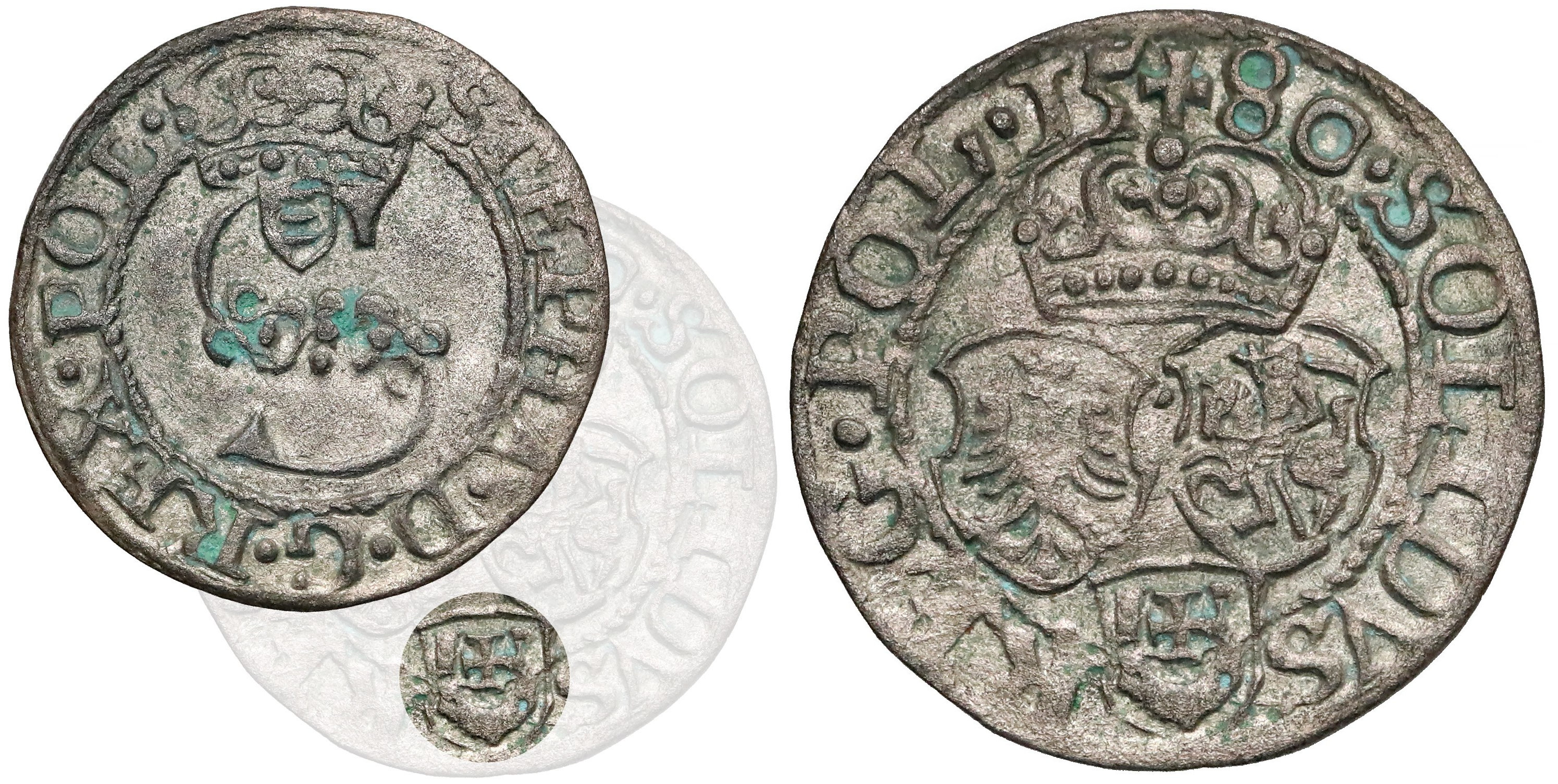 Szeląg koronny 1550 Oklusz